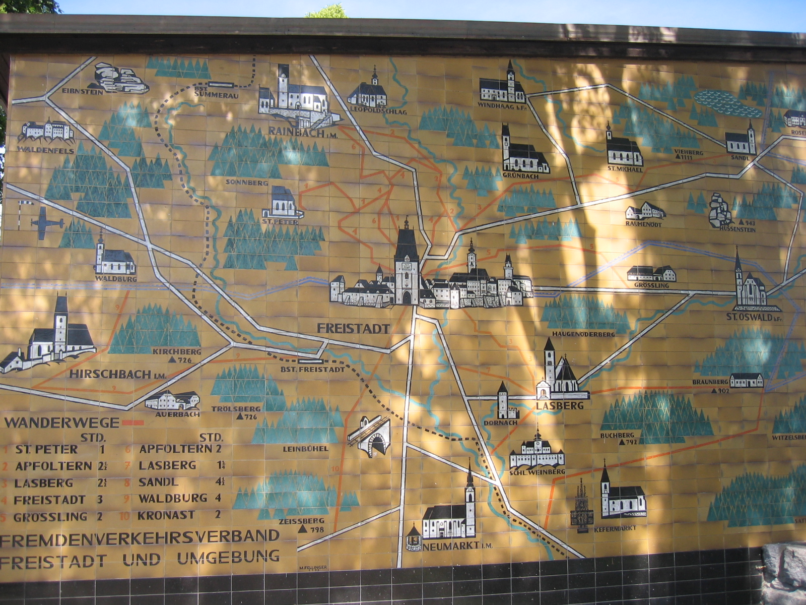 Umgebungskarte - Wanderkarte